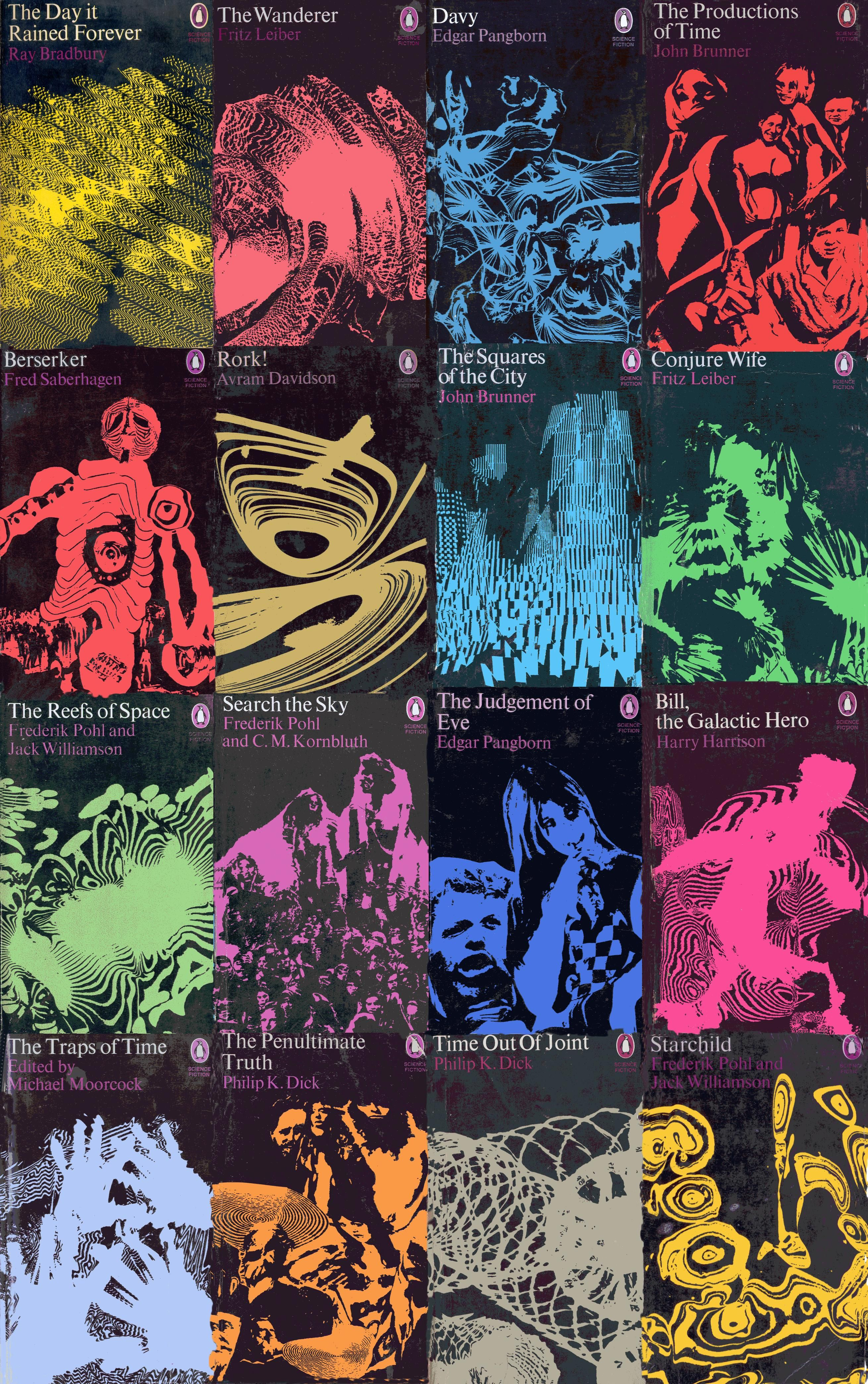 Visione complessiva delle copertine disegnate da Grignani